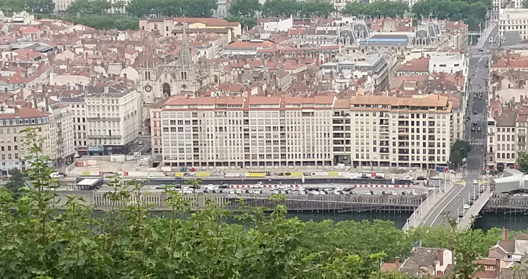 Portion de Saône entre l'ancien pont du Change (à gauche en face de l'église Saint-Nizier) et le pont Maréchal Juin (à droite). Photo prise depuis le point de vue de Fourvière.